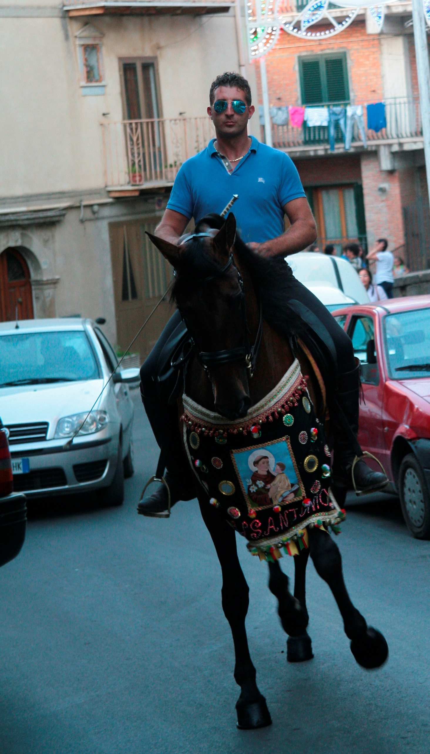 Cavallo per le vie cittadine. Carmelo Lo Cicero a cavallo